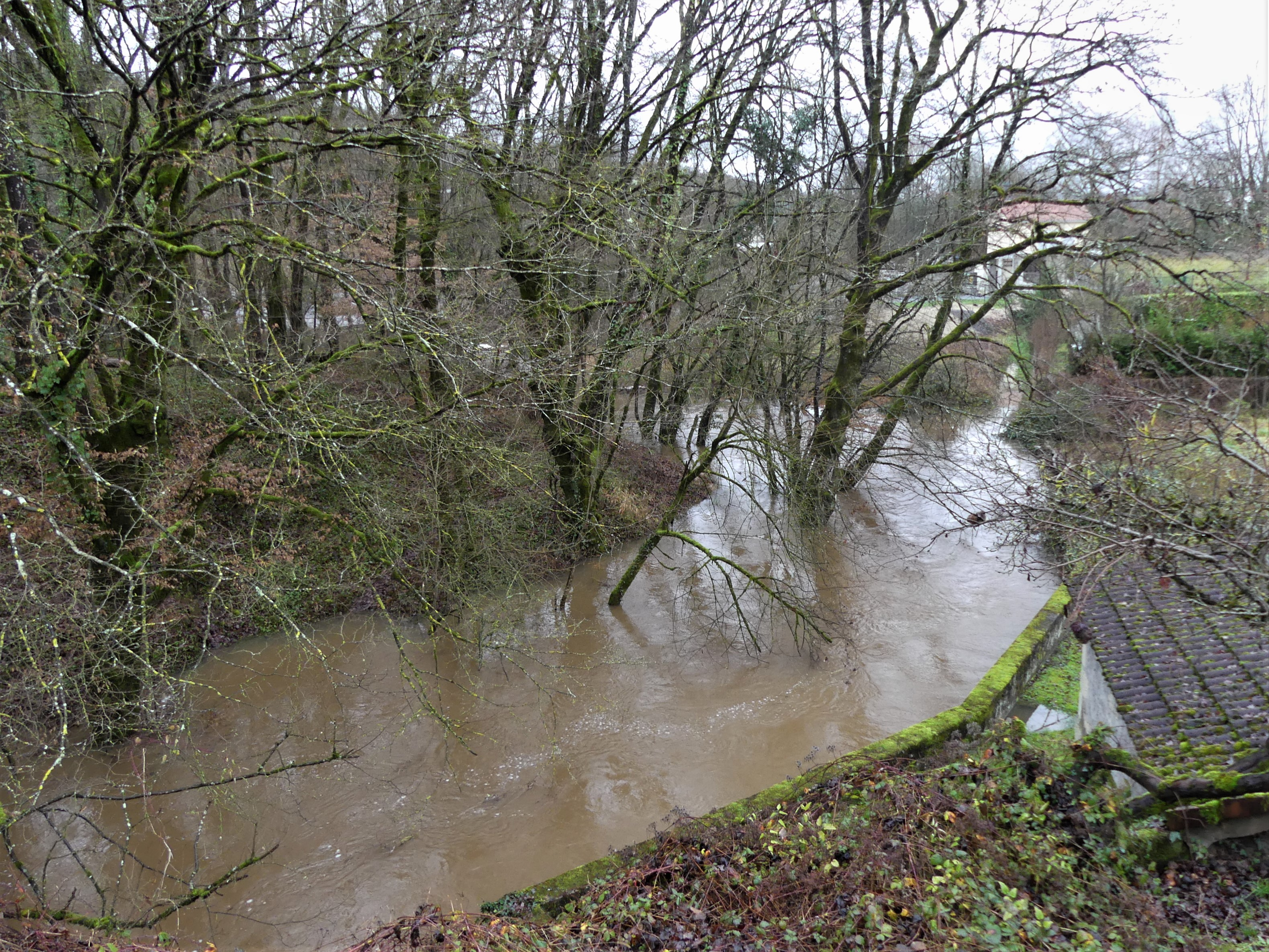 Le Cern en crue en amont du pont de la route départementale 704, Le Lardin-Saint-Lazare, Dordogne, France.